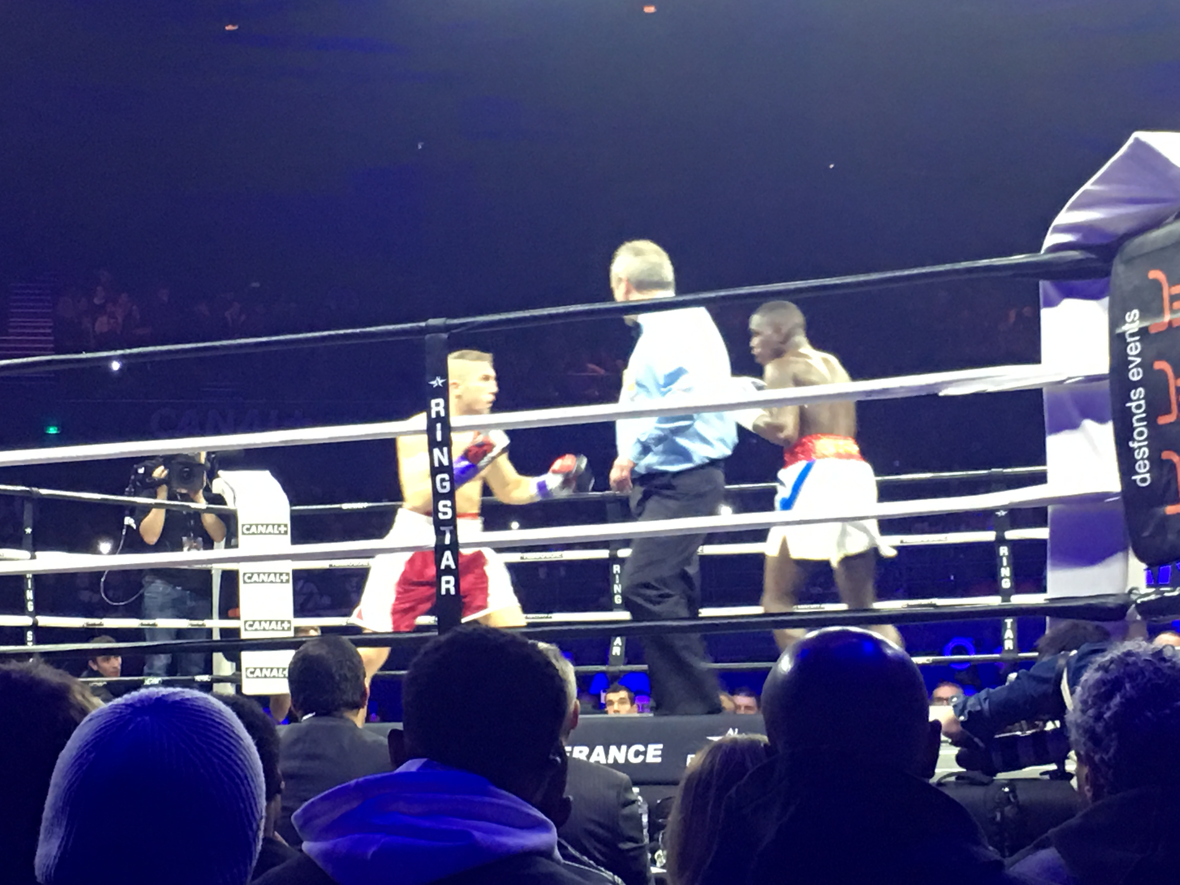 Souleymane Cissokho affronte Romain Garofalo, samedi 9 février 2019 au palais des Sports de Paris. Il gagne par KO au troisième round.